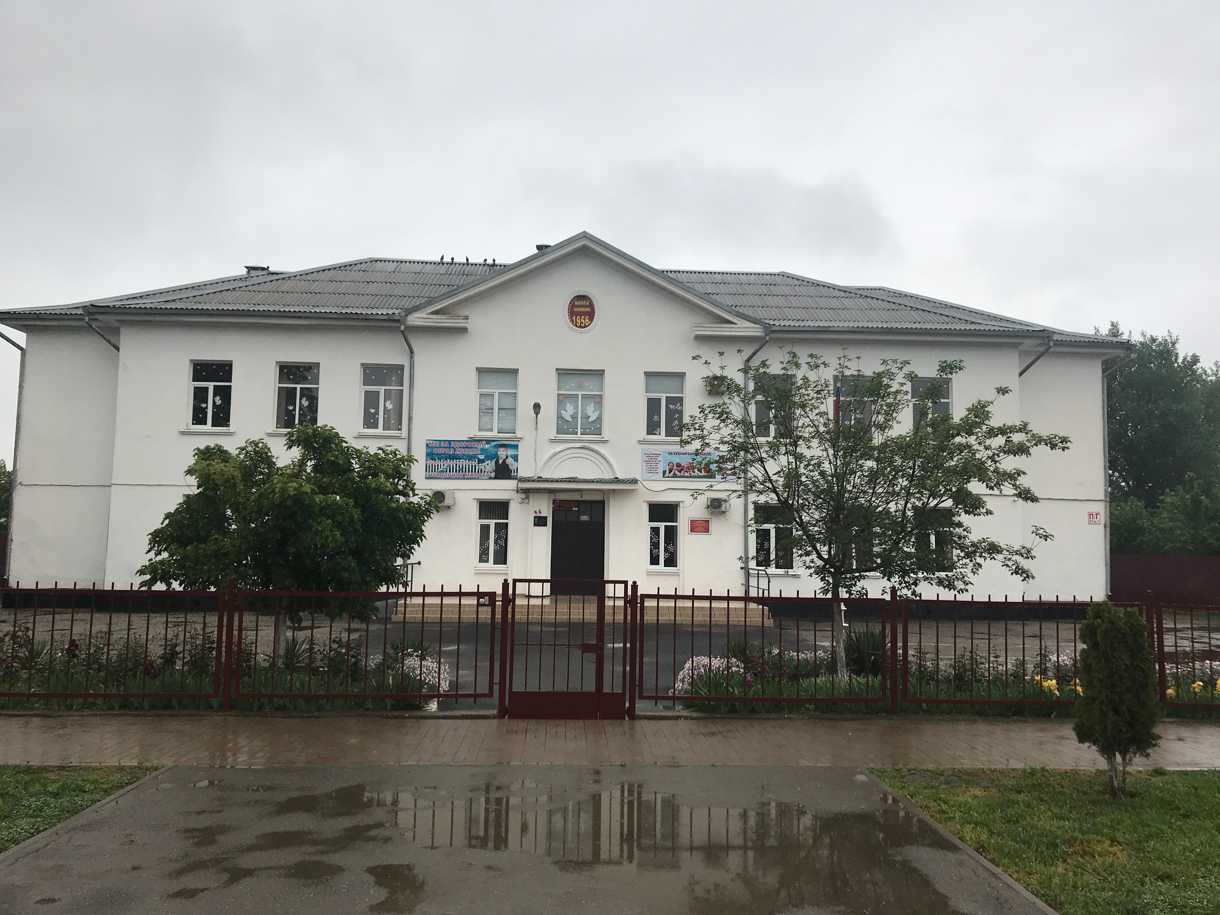 средняя школа №6